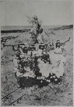 La Floresta, Uruguay - Recuerdos de la Peregrinación del 17 de Diciembre de 1916